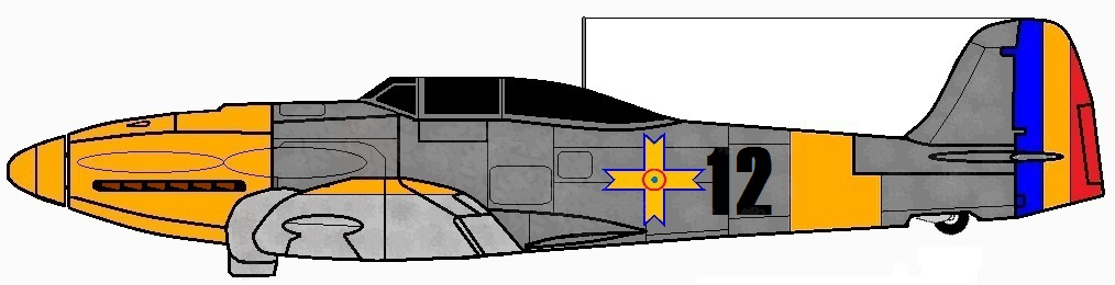 Seitenprofil einer Heinkel He 112 der rumänischen Luftwaffe